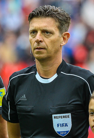 Россия - Португалия